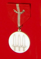 Norske Forsvarsmedaljen med laurbærgren